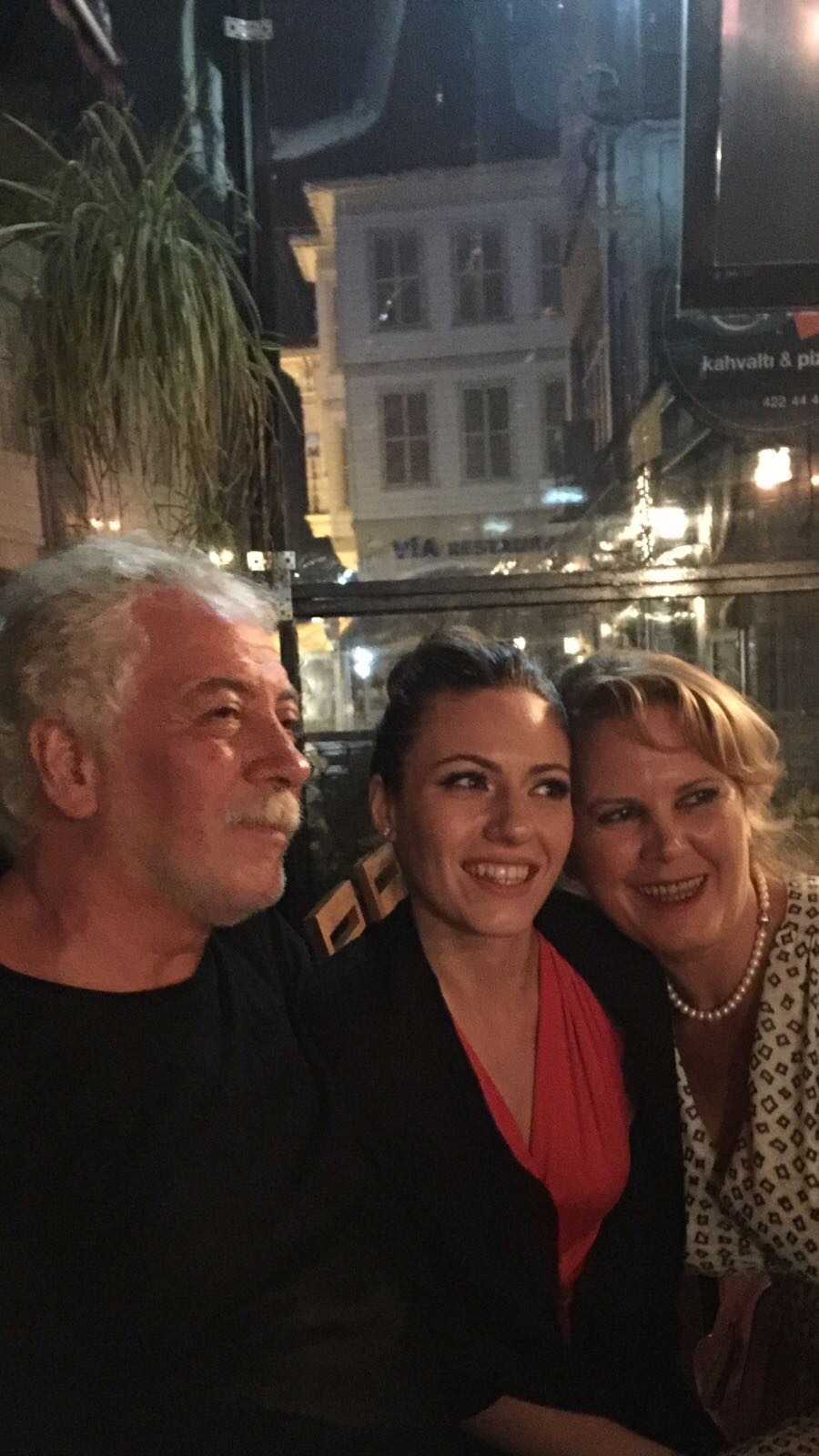 selçuk-eylül-hülya soğukçay